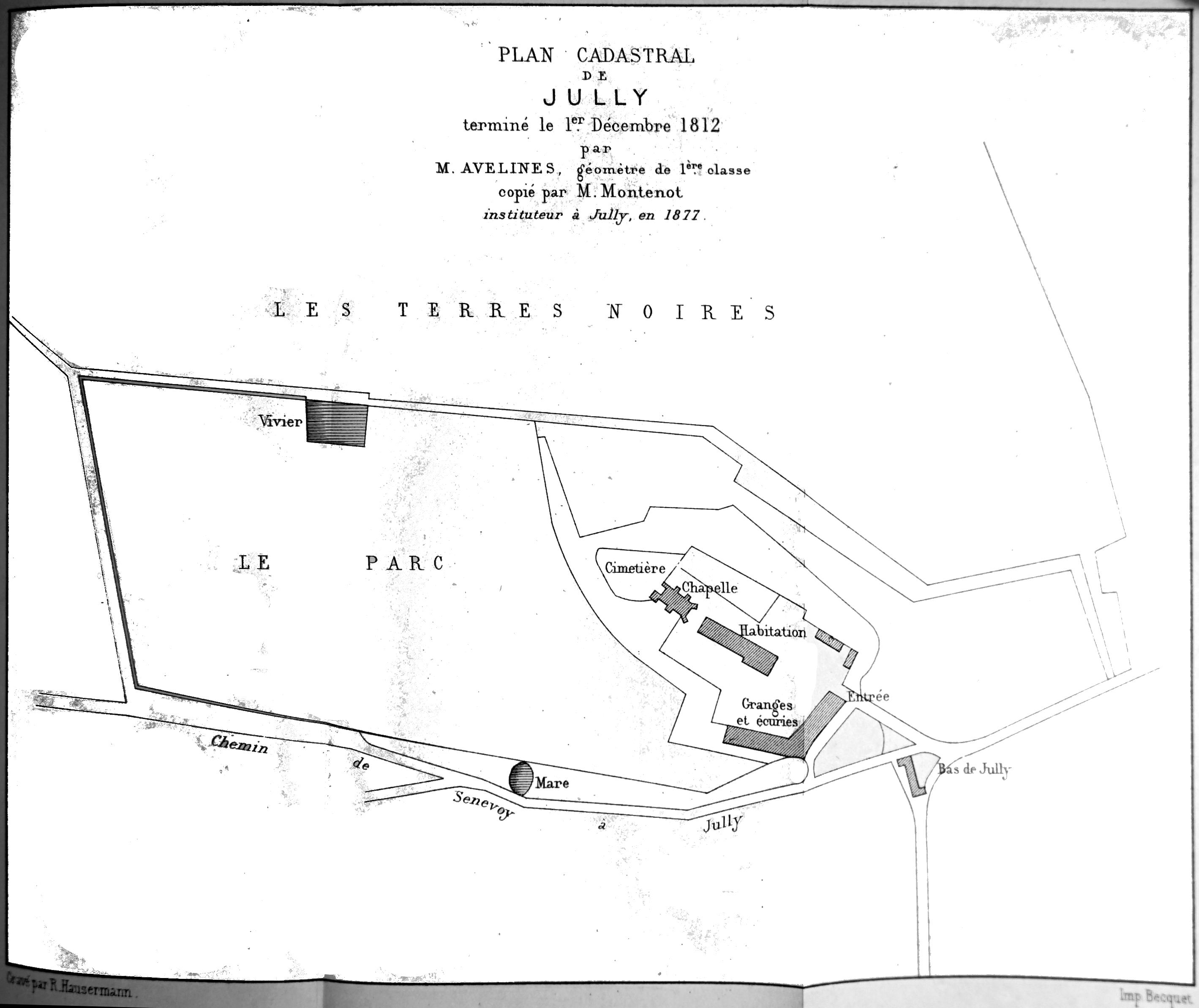 un plan de l'Abbaye de Jully-les-Nonnains.